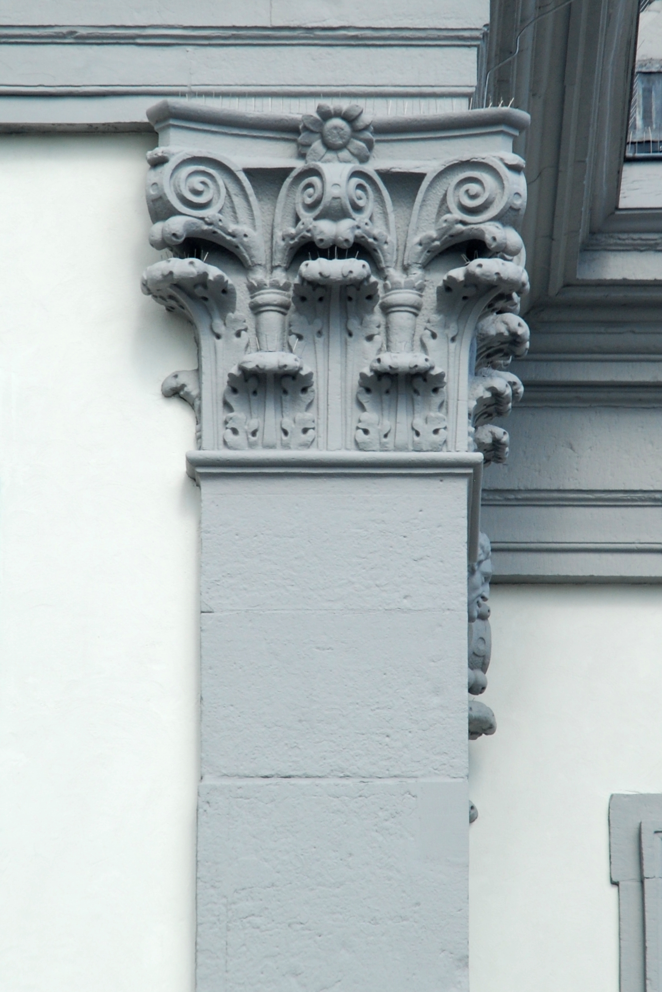 Belgique - Province de Liège - Hôtel de ville de Verviers